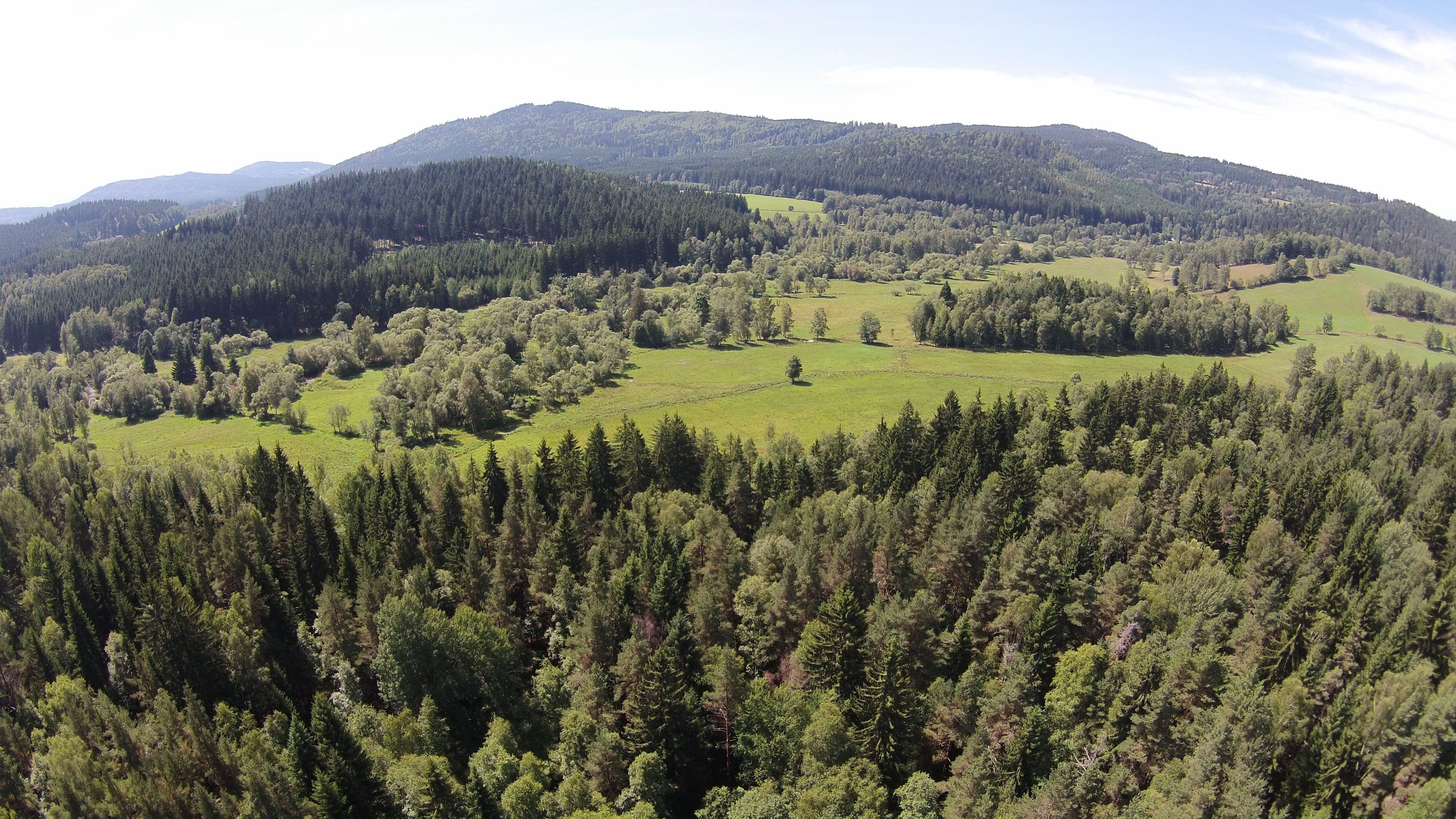 Přírodní rezervace Zátoňská mokřina. Česká republika.